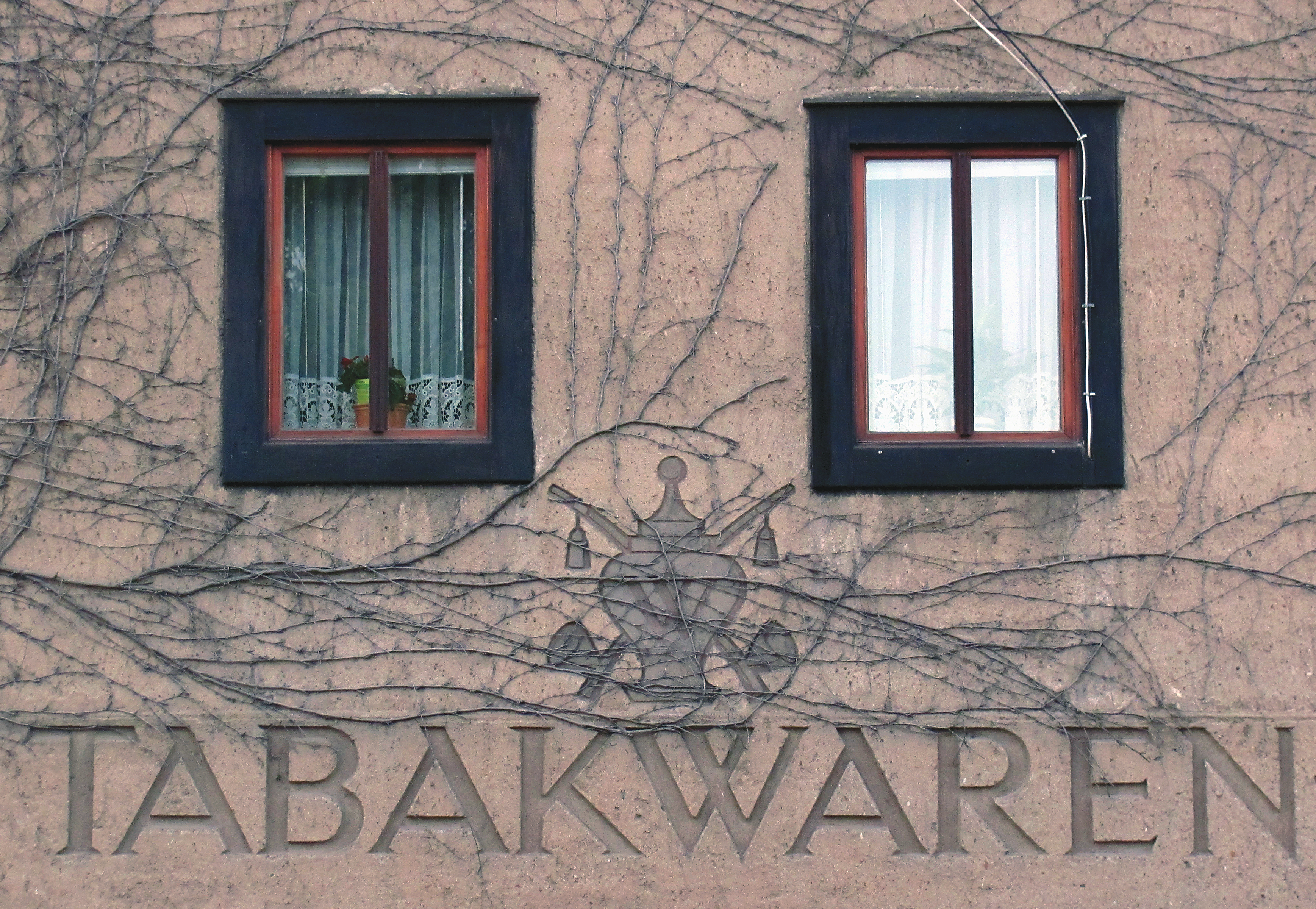 Hermann Glöckner, Zitzschewig, Sgraffiti am Bauernhaus Meißner Straße 443